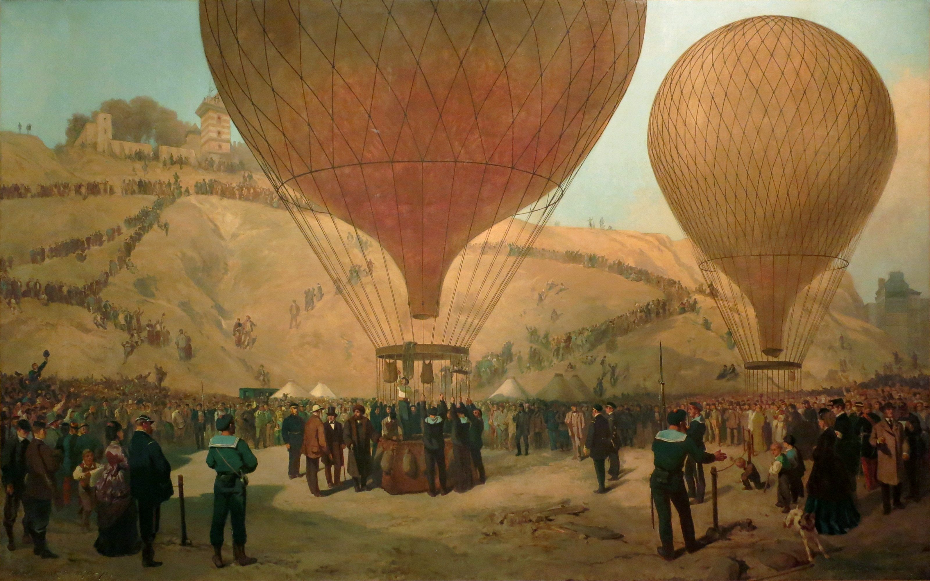 Départ de Gambetta sur le ballon l'"Armand-Barbès" le 7 octobre 1870title QS:P1476,fr:"Départ de Gambetta sur le ballon l'"Armand-Barbès" le 7 octobre 1870" label QS:Lfr,"Départ de Gambetta sur le ballon l'"Armand-Barbès" le 7 octobre 1870"